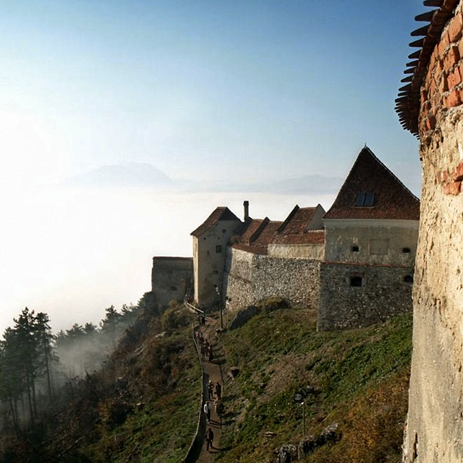 Râşnov Castle